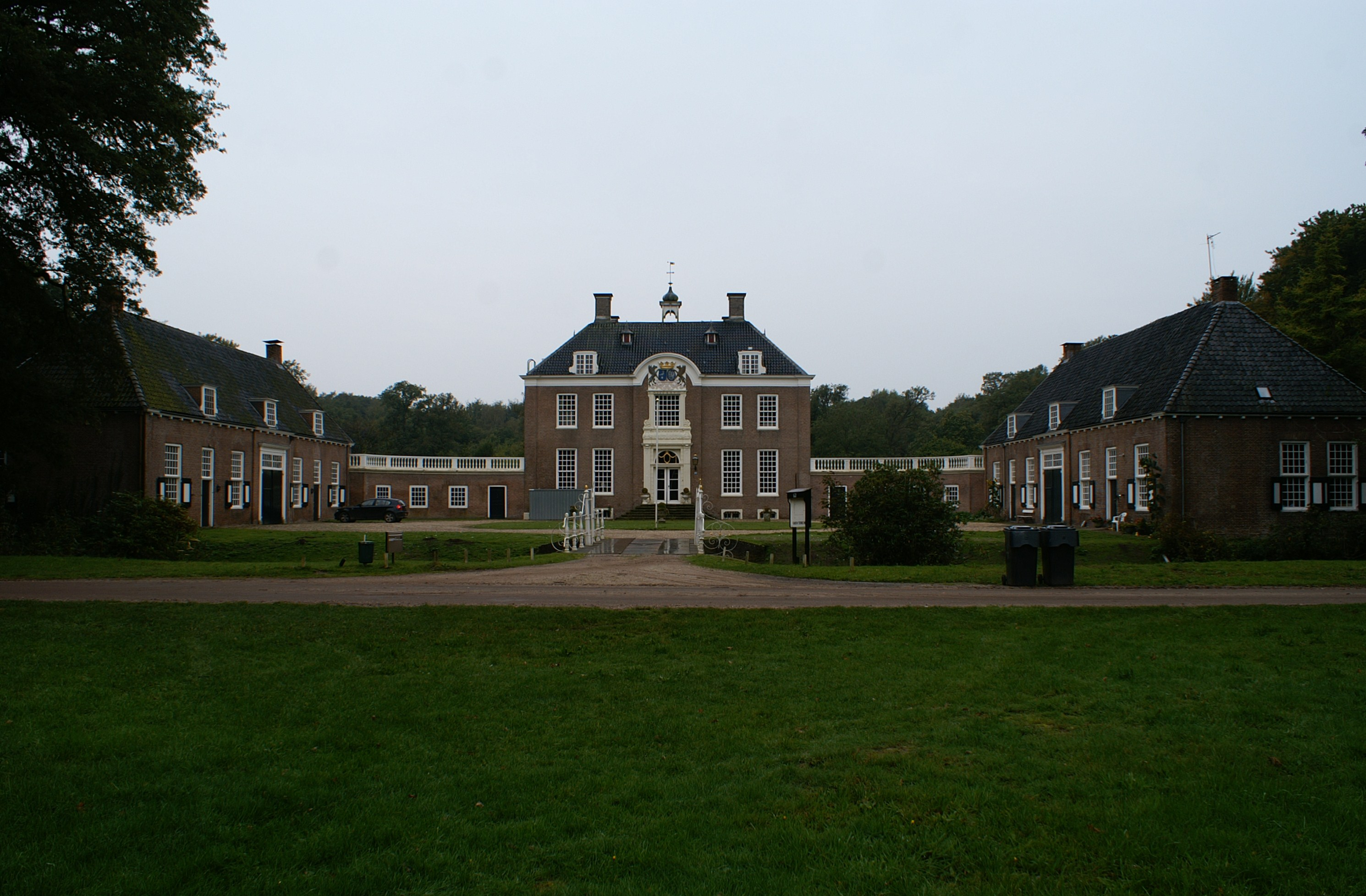 Kasteel Zwaluwenburg te 't Harde.